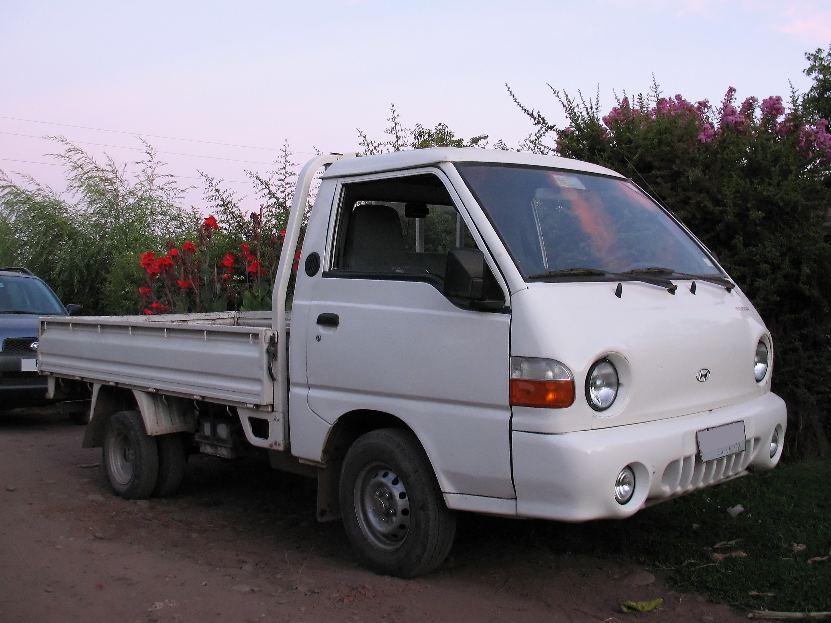 Hyundai H100 Porter 2002